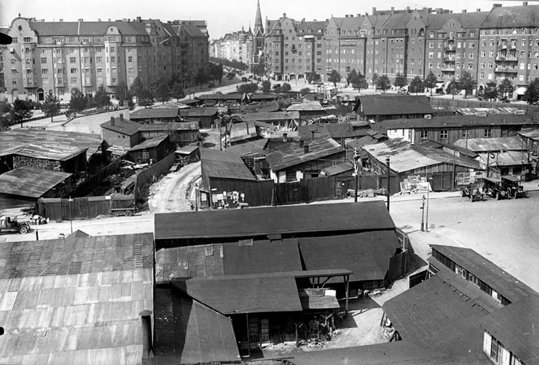 Kvarteret Träskfloden med kåkbebyggelse vid nuvarande Jarlaplan. T.v. Birger Jarlsgatan, t.h. Karlavägen. I fonden Katolsk- Apostoliska kyrkan (nuvarande Grekisk-ortodoxa kyrkan Sankt Georgios). Beteckning: Fotonummer KR 174